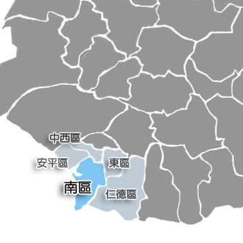 南區相對位置